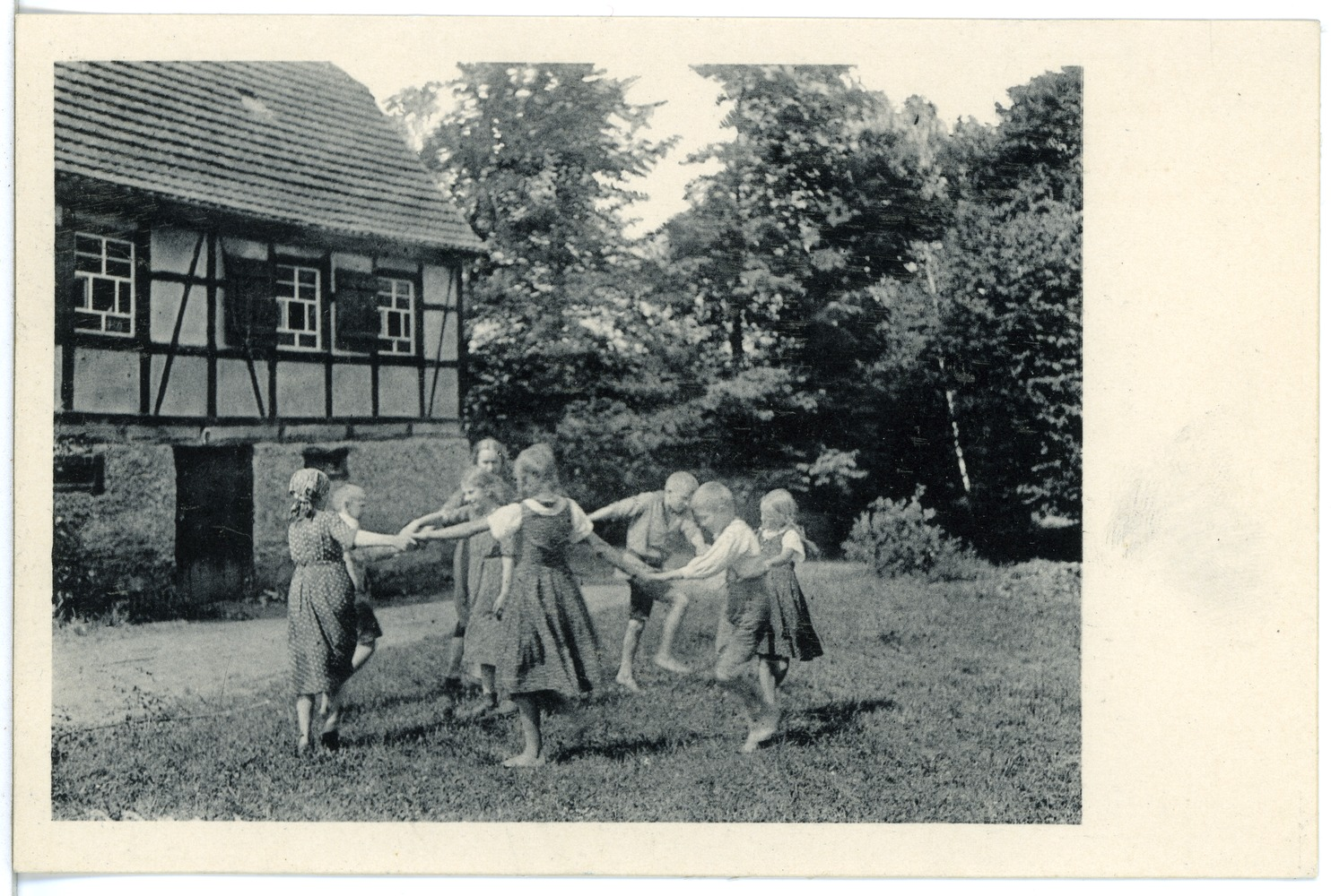 Döbeln; Landheim der Wandervögel This postcard is from publisher Brück & Sohn in Meißen ( postcard has a unique number 19320 and is available in a higher resolution at the publisher. This images was uploaded in a cooperation project between Wikipedians and the publisher.